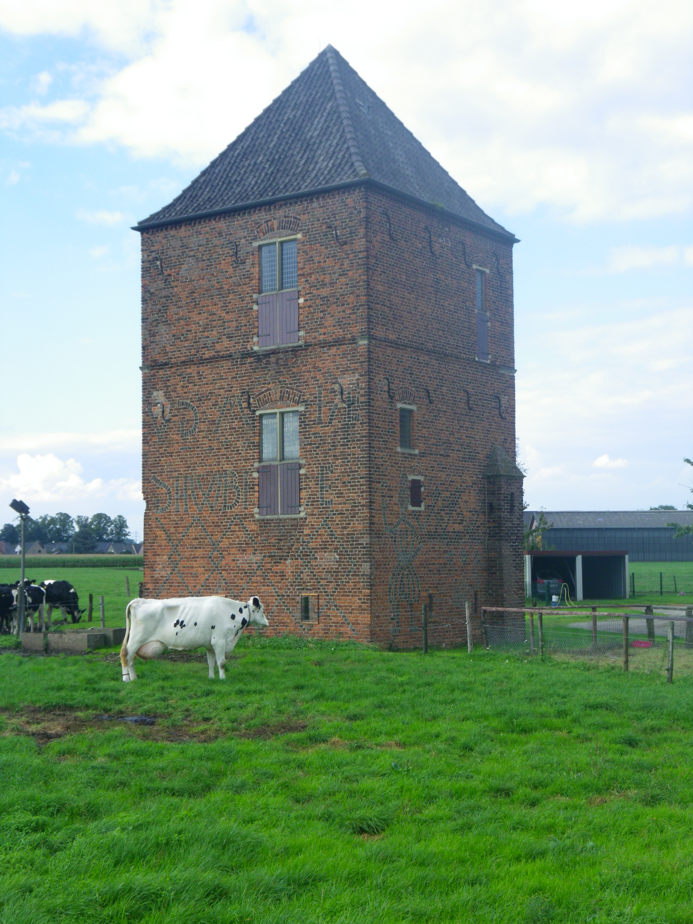 Denkmalgeschützter Wohn- und Wehrturm Erstellung: 15./16. Jahrhundert Ortslage: Haldern, Wertherbrucher Straße 1 Battenbergturm